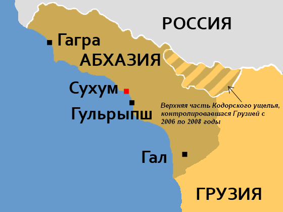 Так называемая «Верхняя Абхазия» на карте